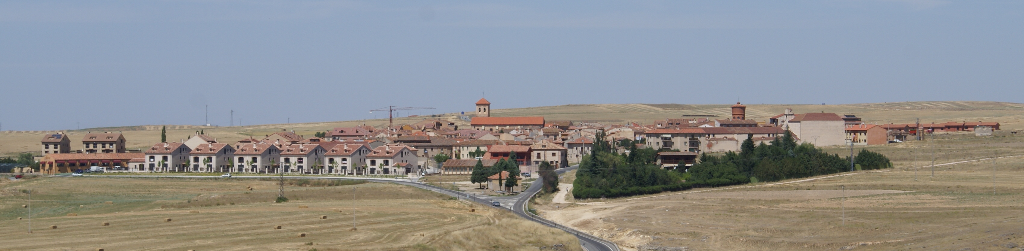 Vista de Zamarramala, Segovia, desde el Alcázar